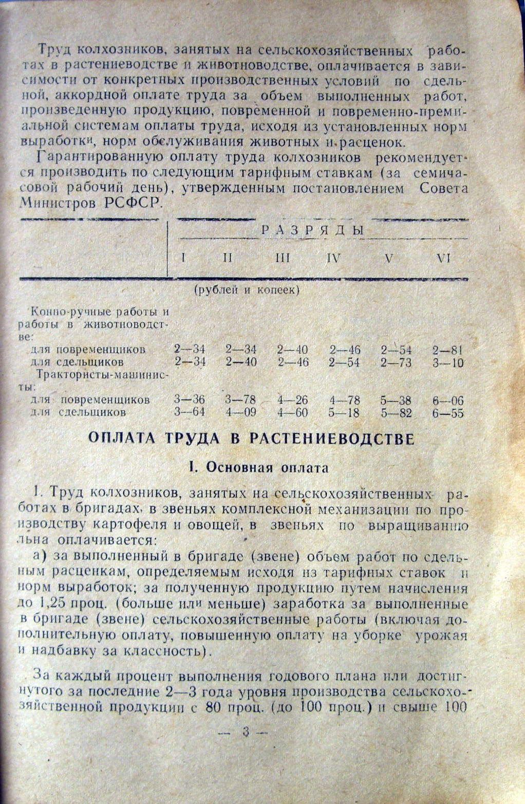 Управление сельского хозяйства Ярославского облисполкома. Областной Совет колхозов. "Положение об оплате труда работников колхоза". Г. Ярославль, 1972 г.